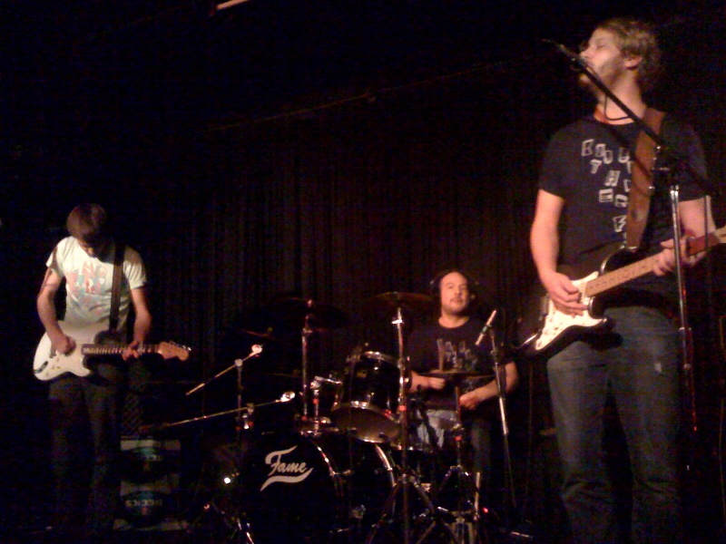 Knut Stenert (Gitarre, Gesang), Gregor Schenk (Gitarre, Keyboards) und Jörn Brucker (Schlagzeug) als "Knut und die Herbe Frau" am 20.11.2009 im Lovelite (Berlin)